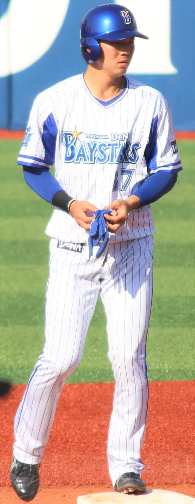 横浜DeNAベイスターズ外野手の楠本 泰史。横浜スタジアムにて。